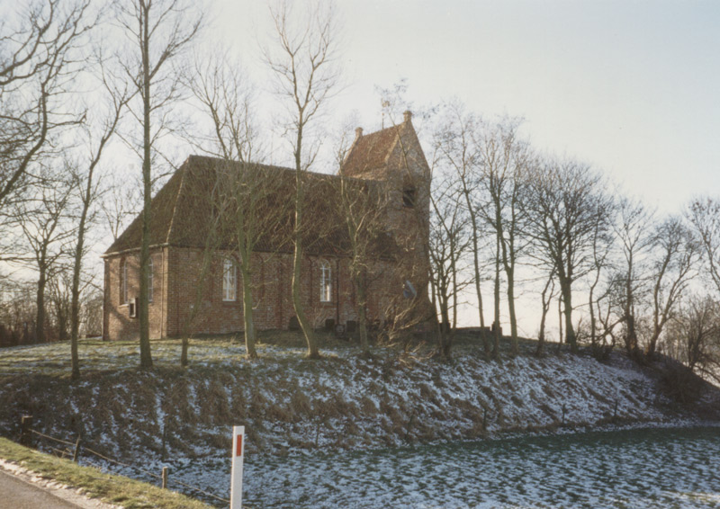 Terp van Oostum (prov.Groningen, Nederland) in 1997